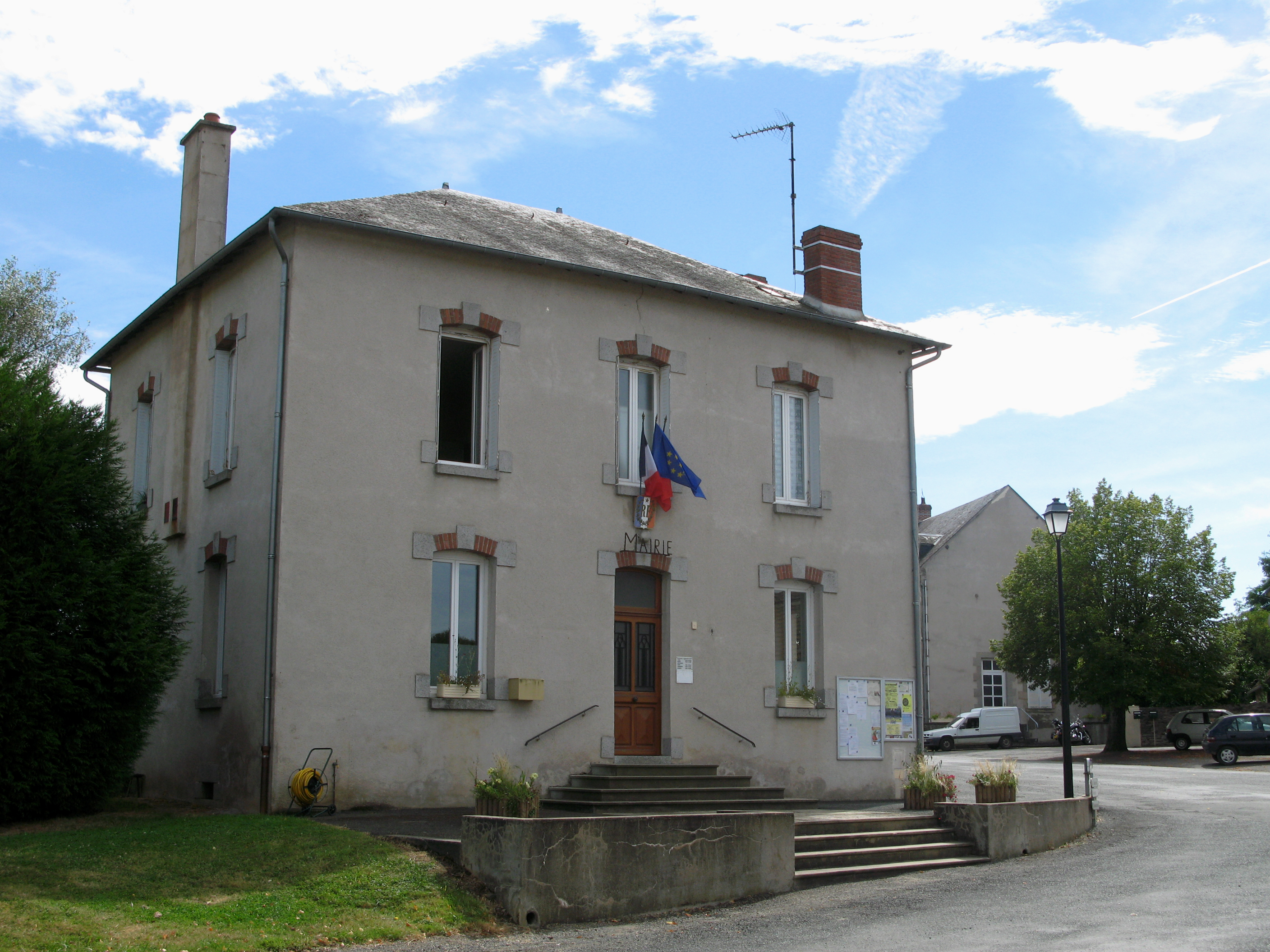 Villard (Creuse, France) - La mairie. . .